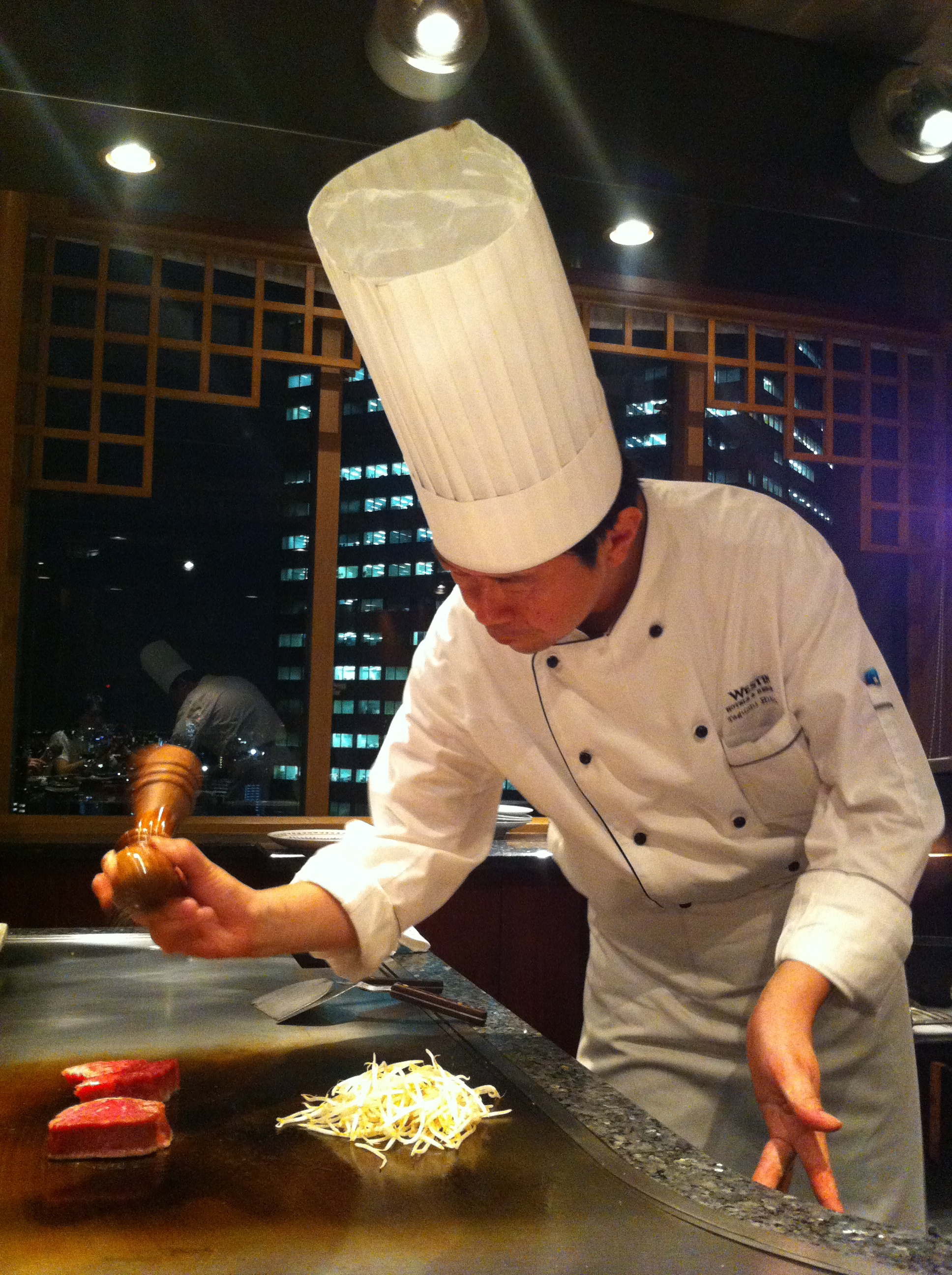 鉄板焼き恵比寿